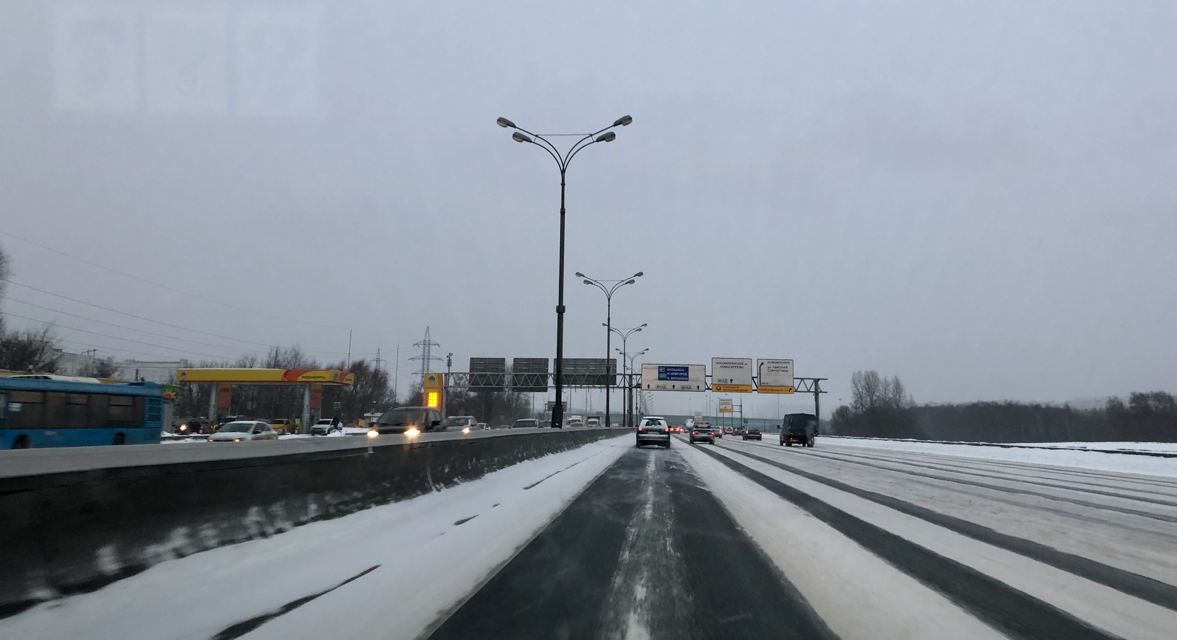 МКАД